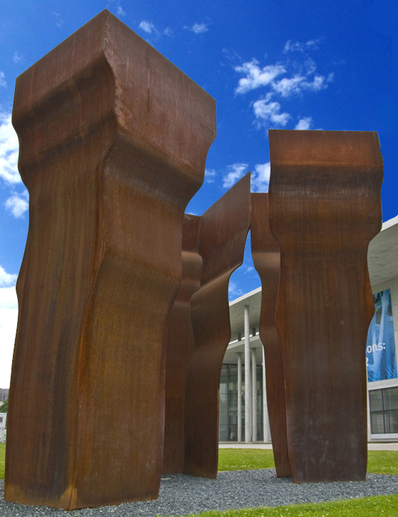 Eduardo Chillida Buscando la Luz 1997 Sculpture in Munich/Germany Skulptur München Pinakothek der Moderne